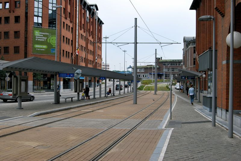 Vue de la station Tirou depuis le boulevard Tirou.